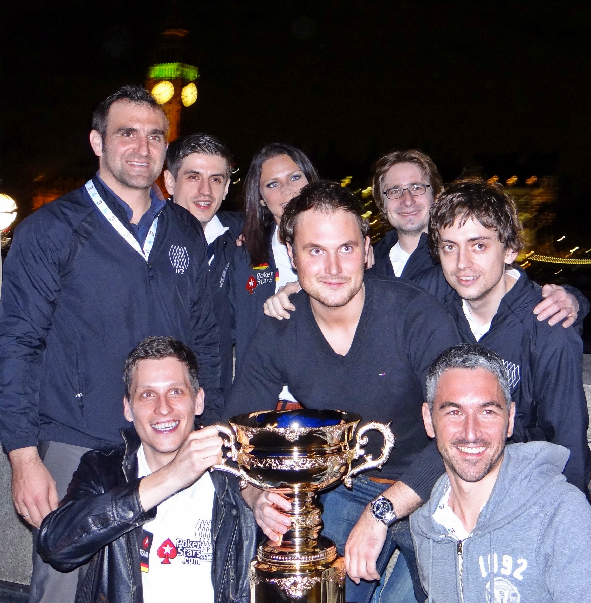 Siegerbild des Team Germany bei IFP Nations Cup 2011 in London